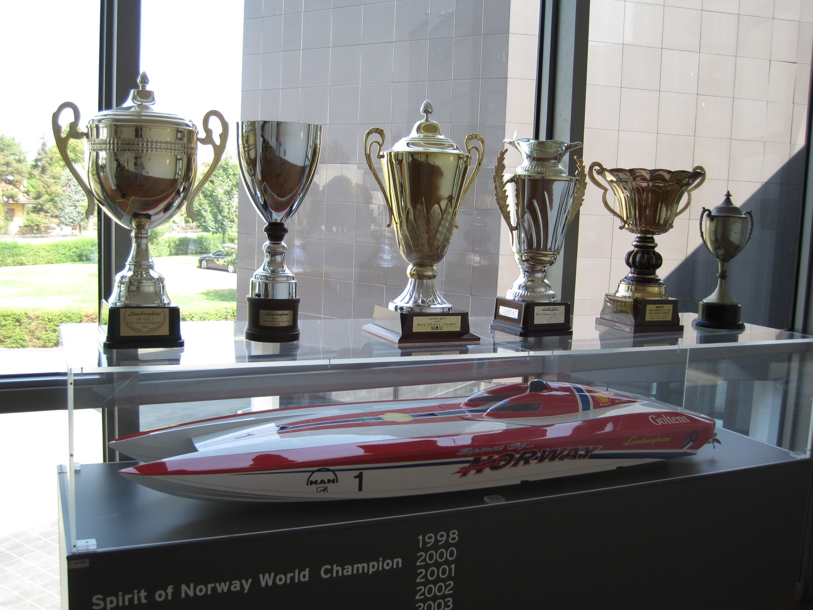 Musée Lamborghini - Offshort Spirit of Norway